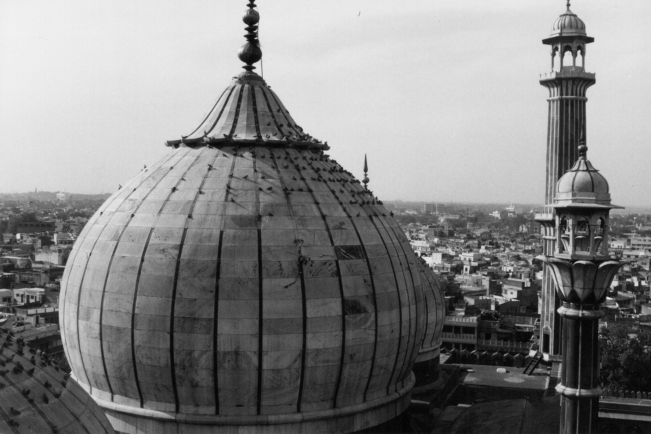 Coupole de Jama Masjid, Dehli